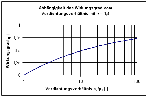 Abhängigkeit des Wirkungsgrad des Joule-Prozess vom Verdichtungsverhältnis beispielhaft mit Excel lässt grüßen Seldon11 11:31, 19 October 2006 (UTC)